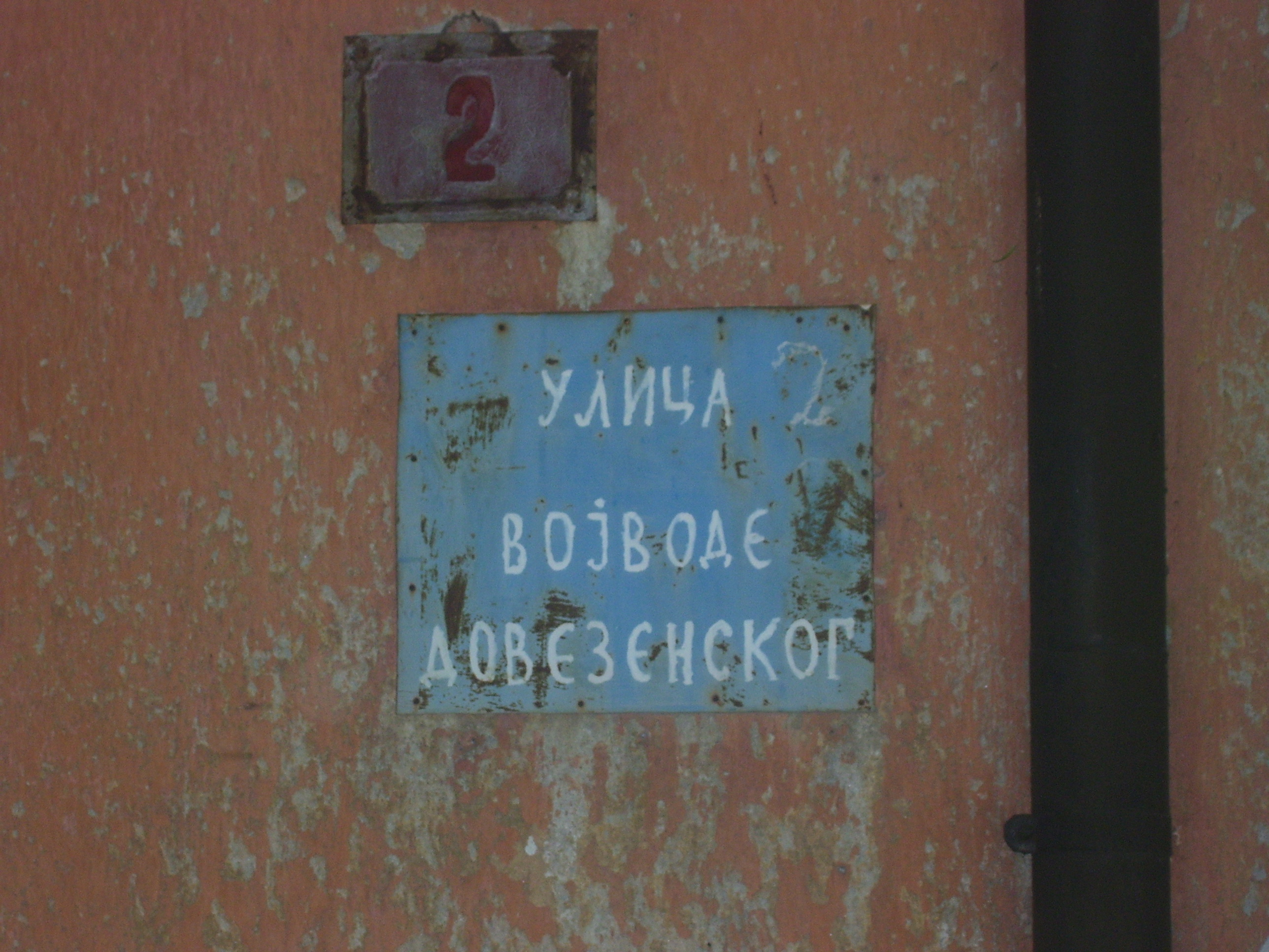 Улица Войвода Довезенски в Белград, Сърбия.